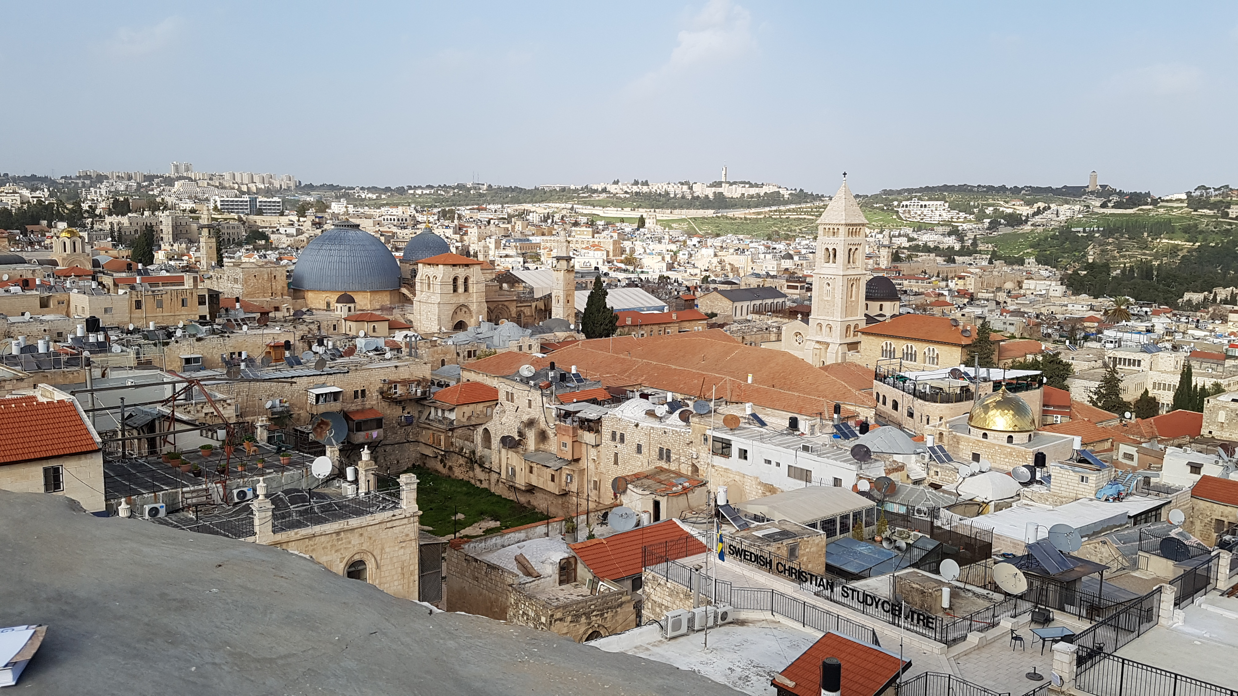 Vielle ville de Jérusalem depuis la citadelle